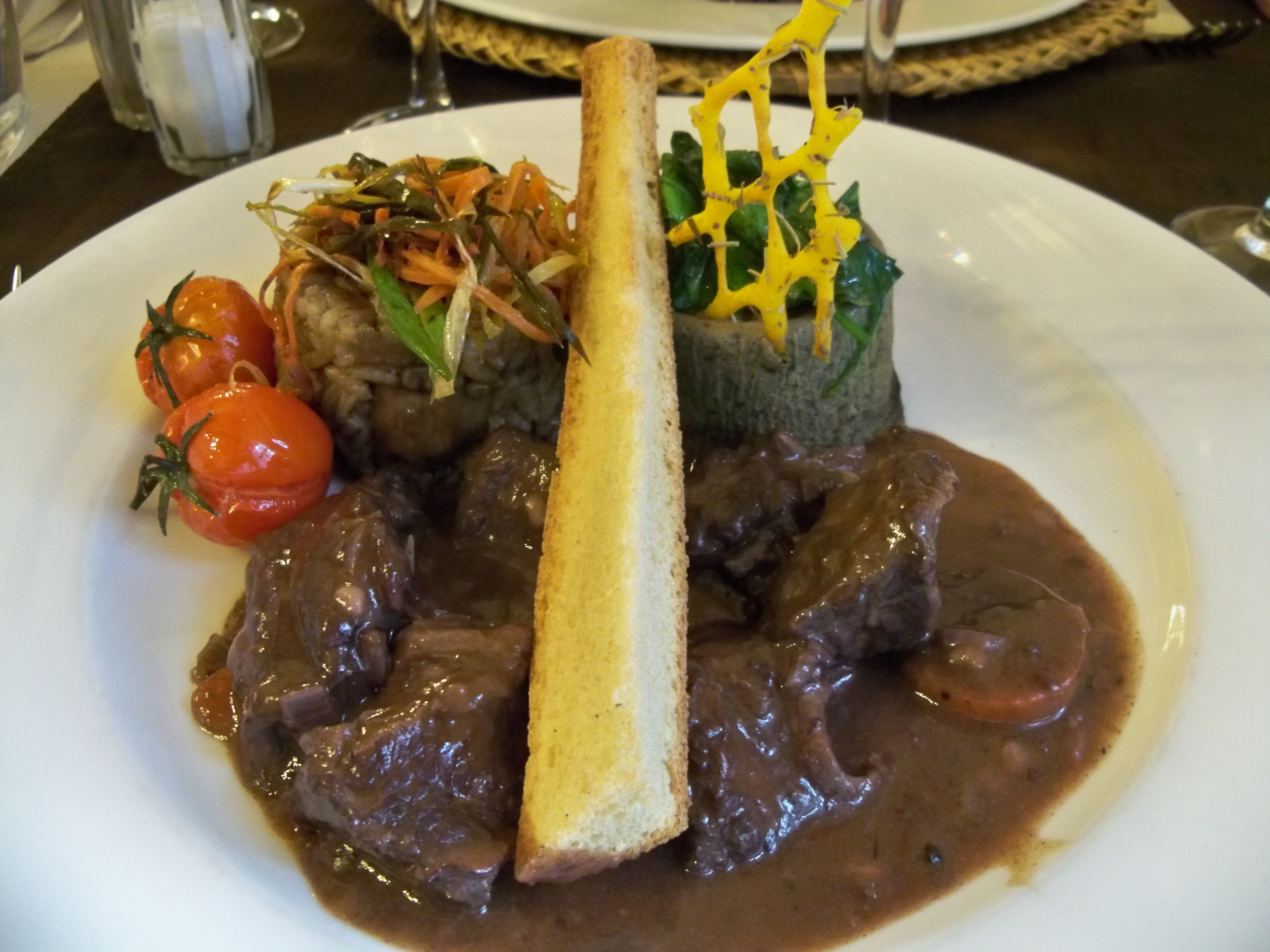 assiette de Broufade, plat camarguais